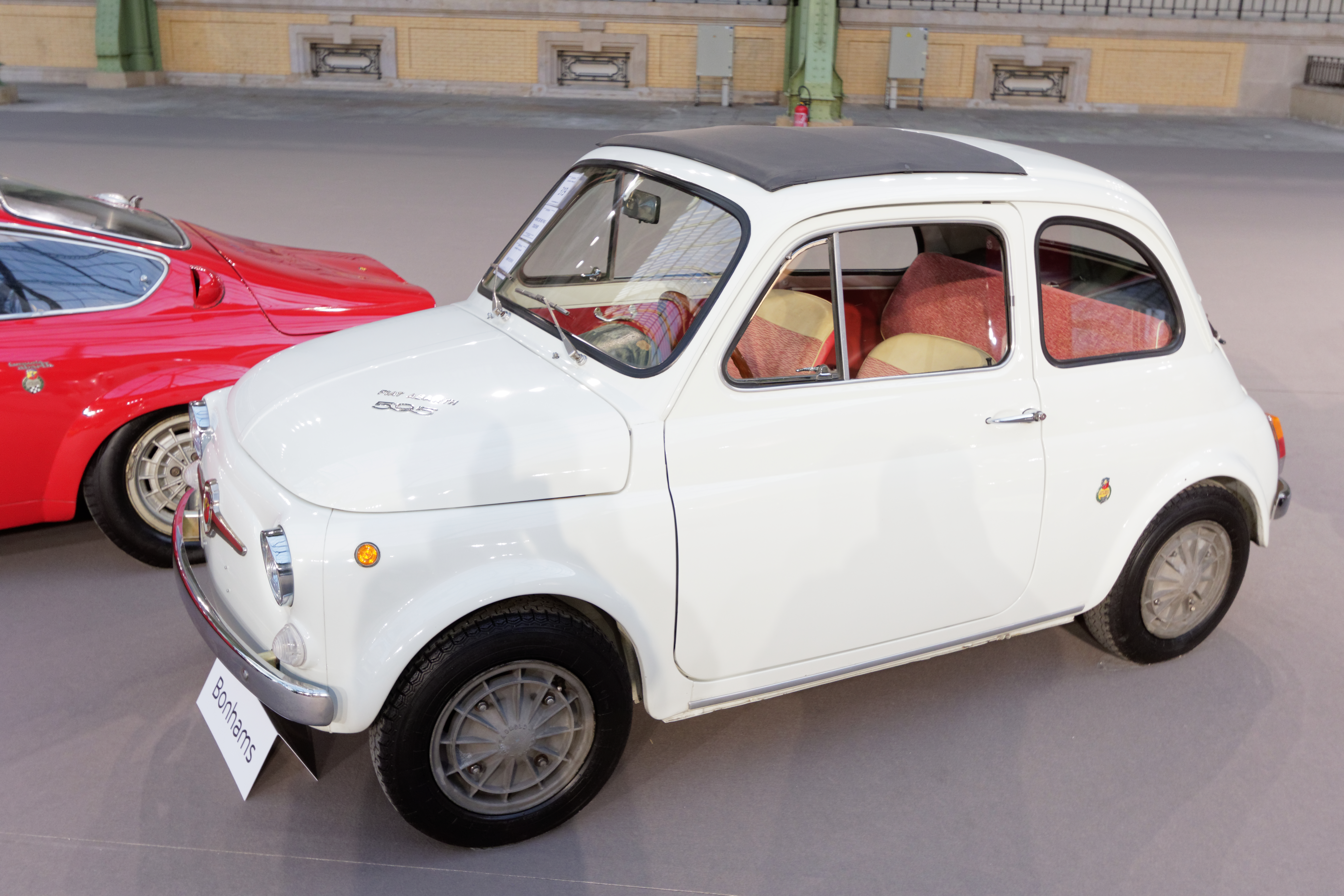 Un des véhicules présenté lors de la vente aux enchères Bonhams 2015 au Grand Palais de Paris.